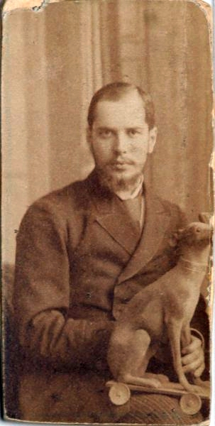 Столыпин, Александр Аркадьевич